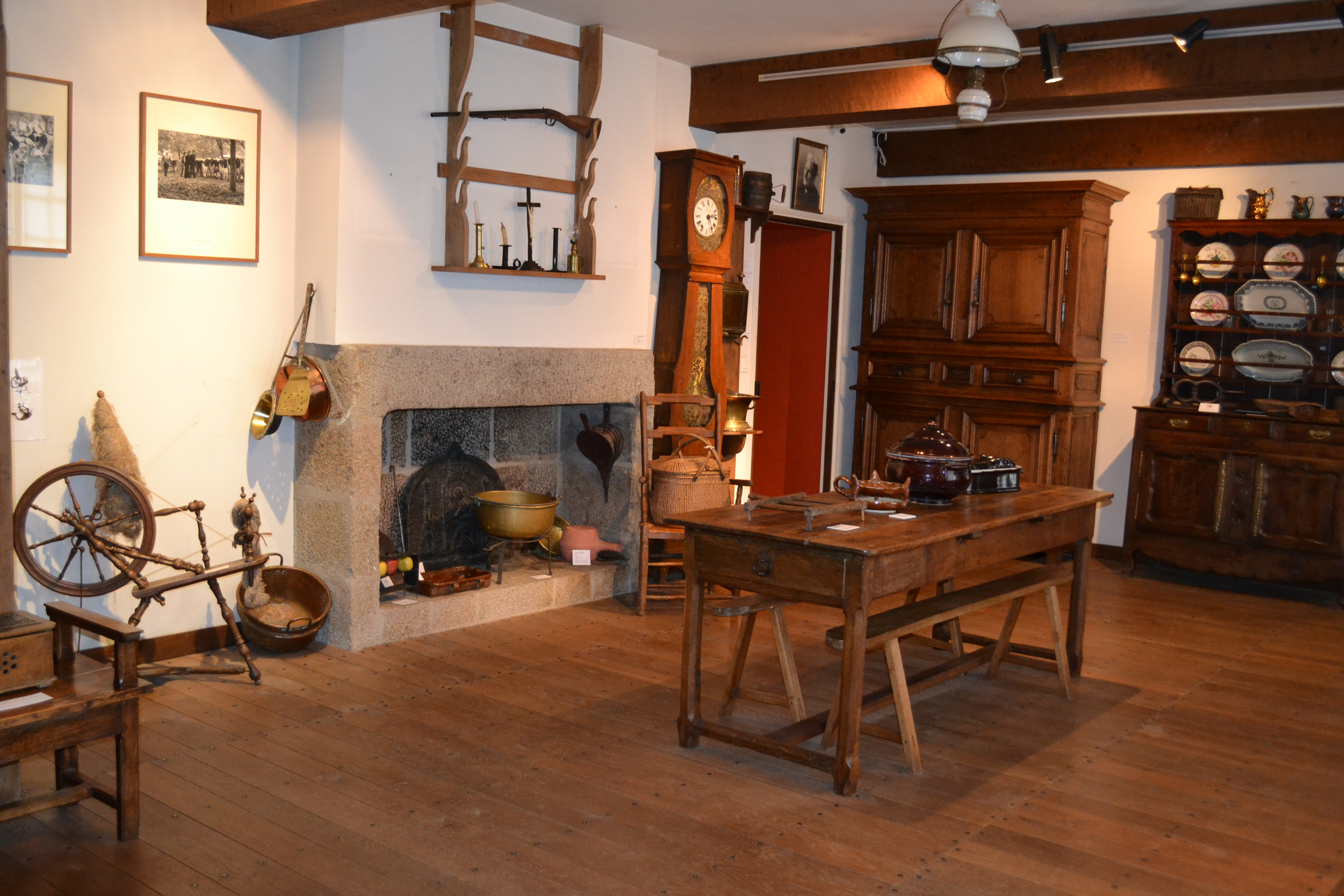 Une des salle de l'exposition permanente du Musée municipal de Vire